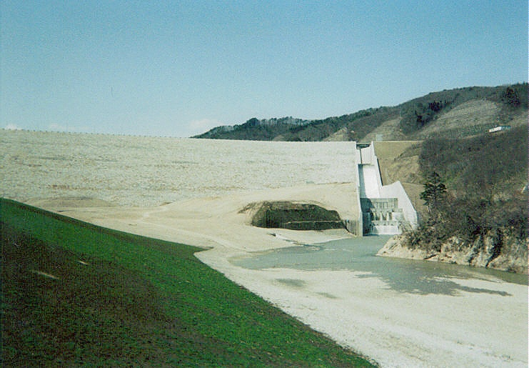 Dam